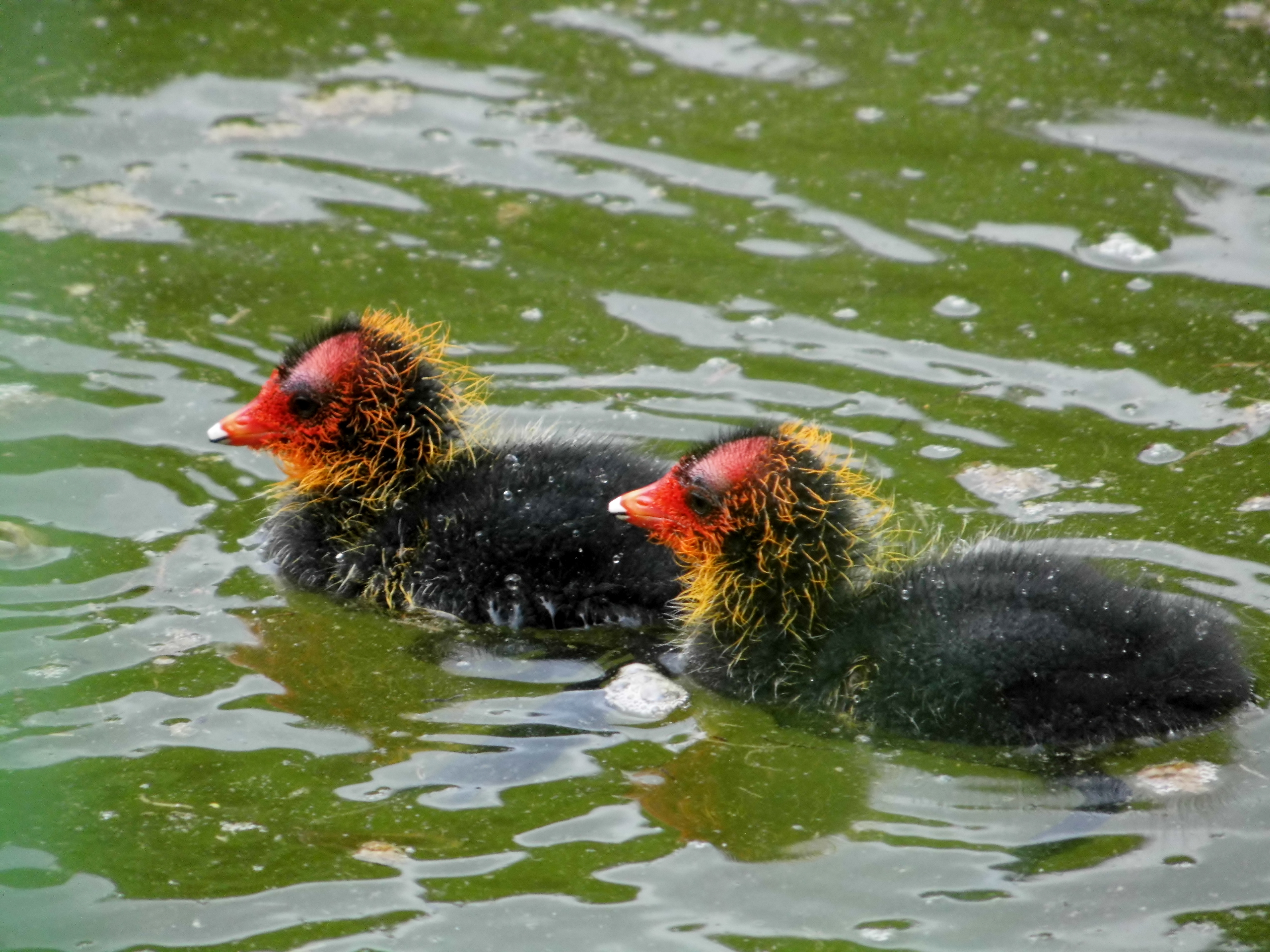 Blässhuhn-Küken am Wöhrsee, LSG Salzachtal im Gebiet der Stadt Burghausen